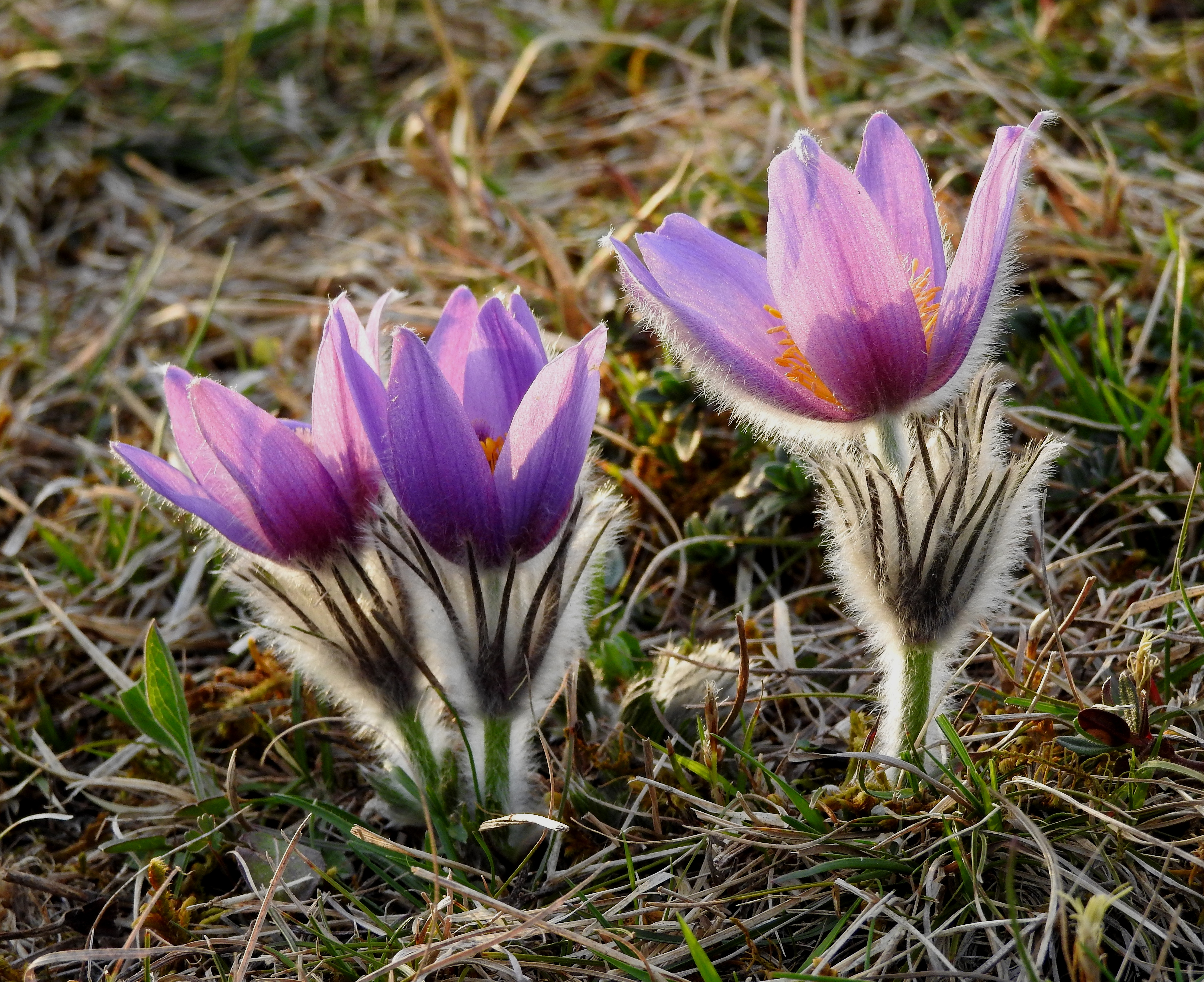 Küchenschellen auf dem Bäckerbichl (Naturdenkmal) in Andechs.